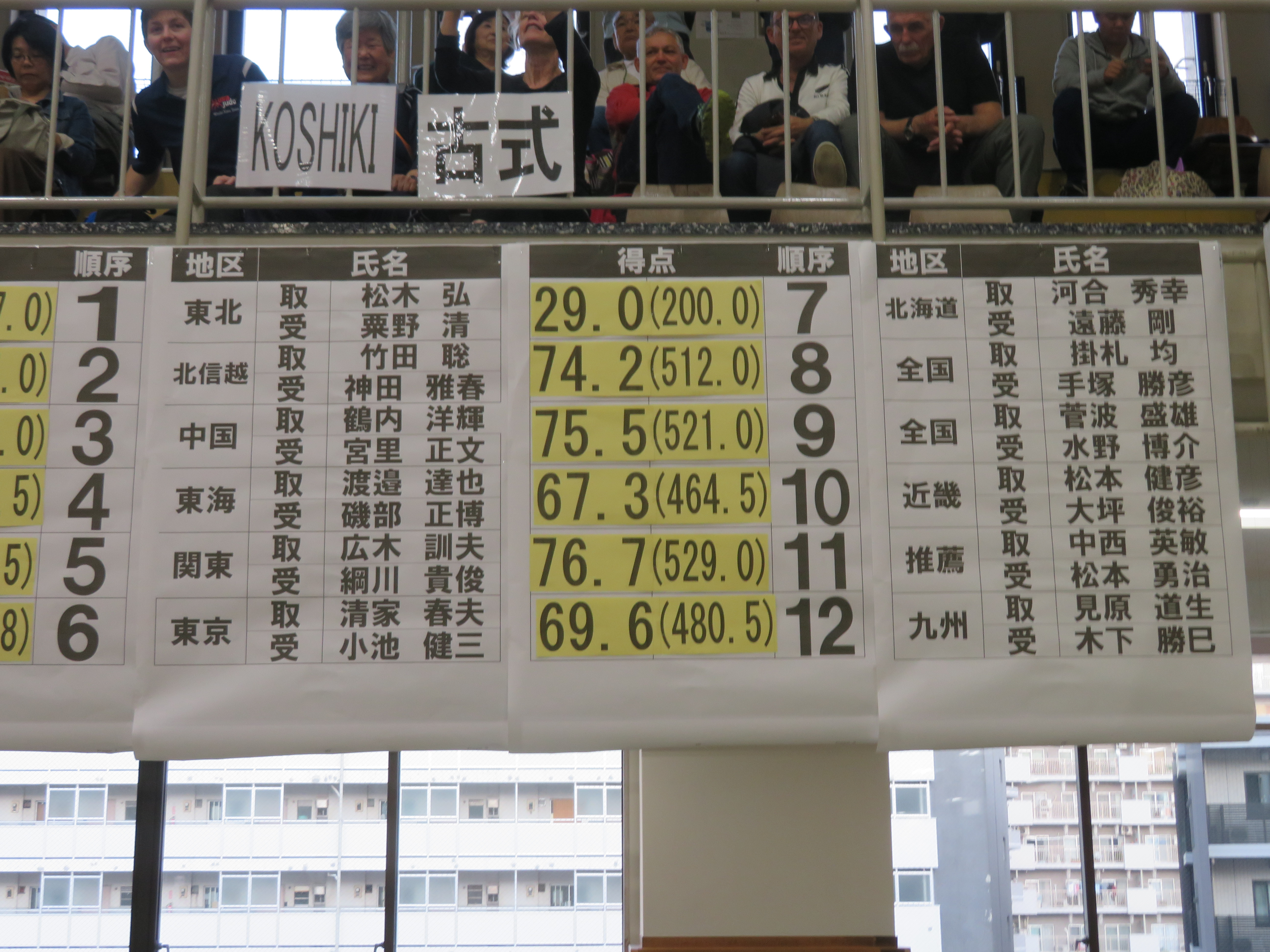 柔道の形 得点表